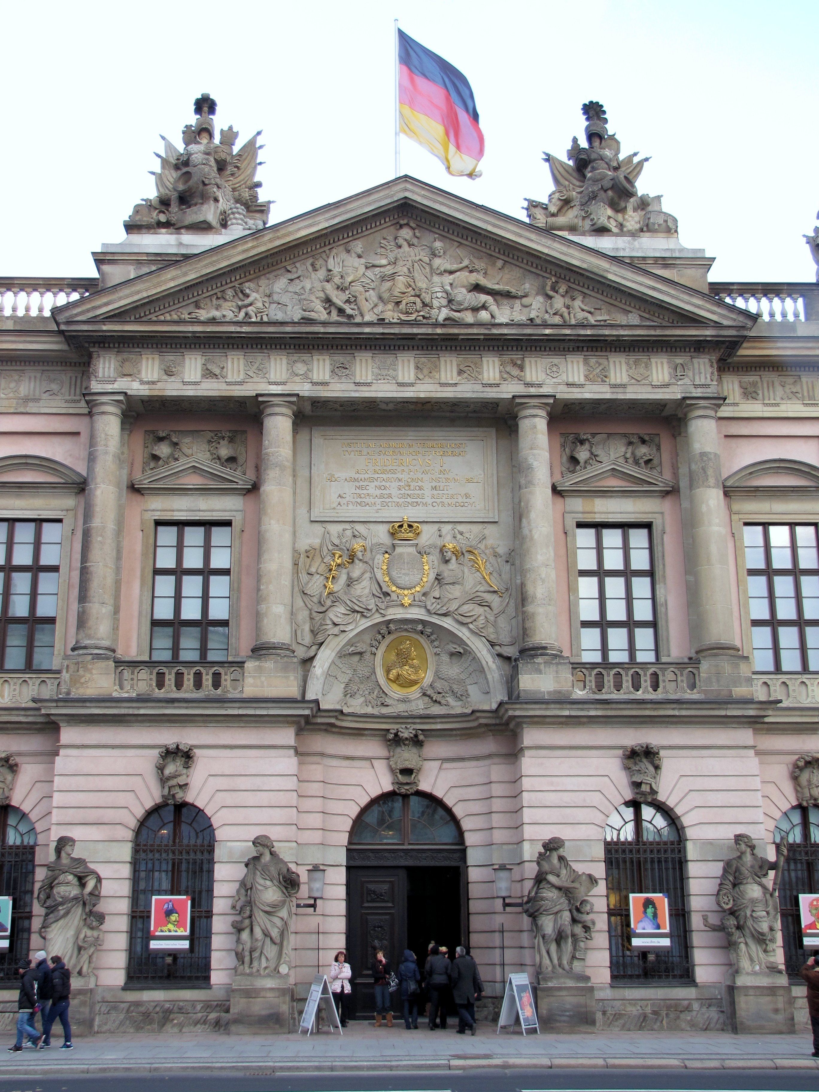 Berlin, Zeughaus, Südseite, Hauptportal.